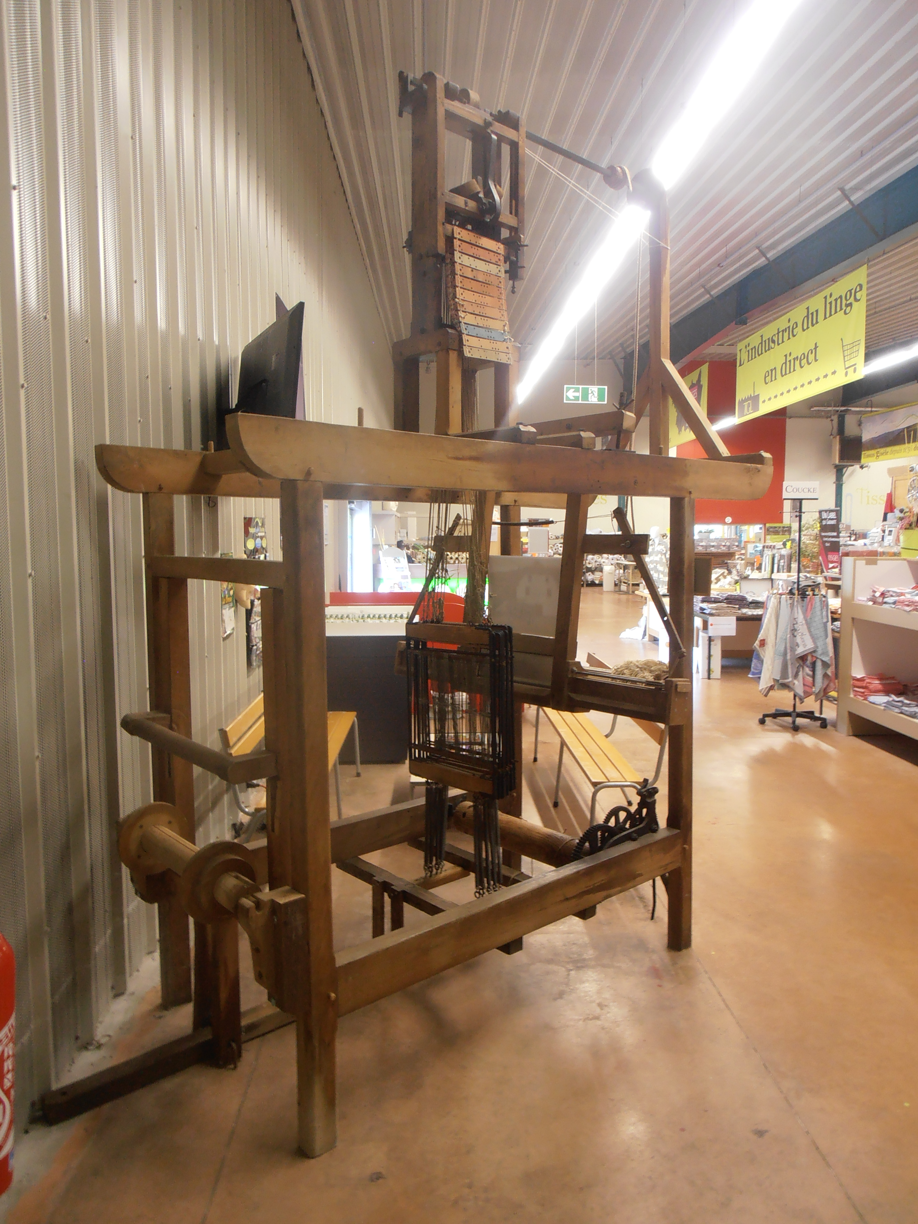 Vosges, La Bresse, Métier à tisser manuel à mécanique Jacquard (1860), présenté dans le magasin « Tissus Gisèle ». Machine prêtée par le musée du textile des Vosges à Ventron. Ce métier a été utilisé par l'entreprise SATO à Bavay, dans le Département du Nord (59), pour exécuter des tampons en coton pour le graissage des roues de trains.